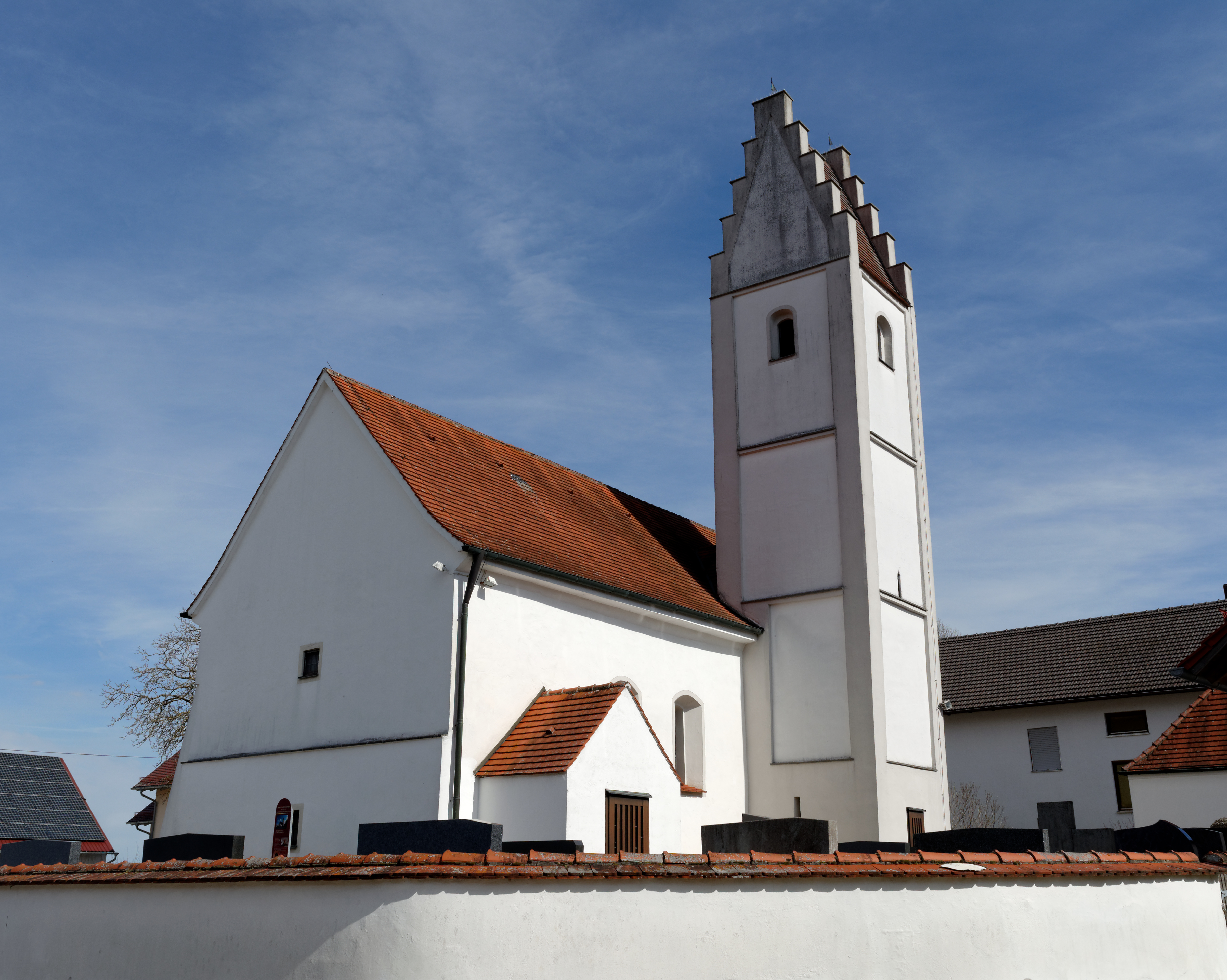 Flachgedeckter Saalbau mit dreiseitig geschlossenem Chor, Langhaus wohl 14. Jahrhundert, Chor und Turm vermutlich Anfang 16. Jahrhundert. Bayerische Denkmalliste Nr. D-7-71-162-10